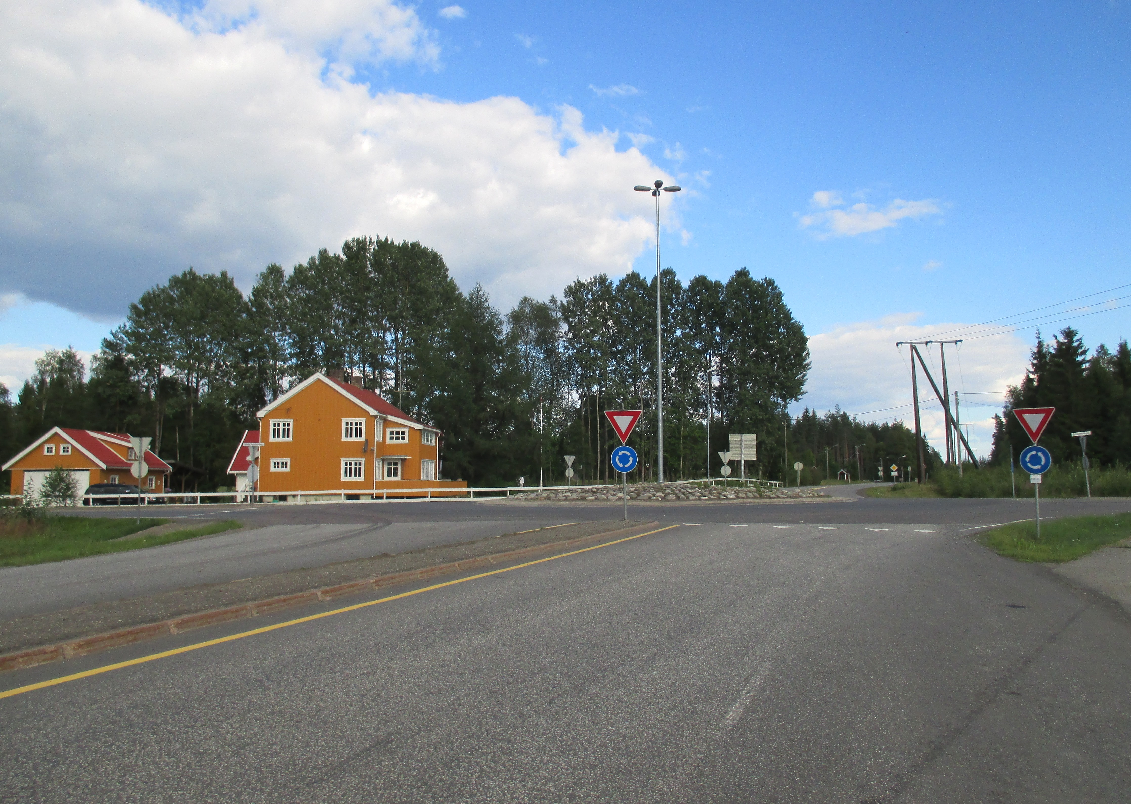 Nordmokorset i Nannestadd sett vestfra langs fylkesvei 120